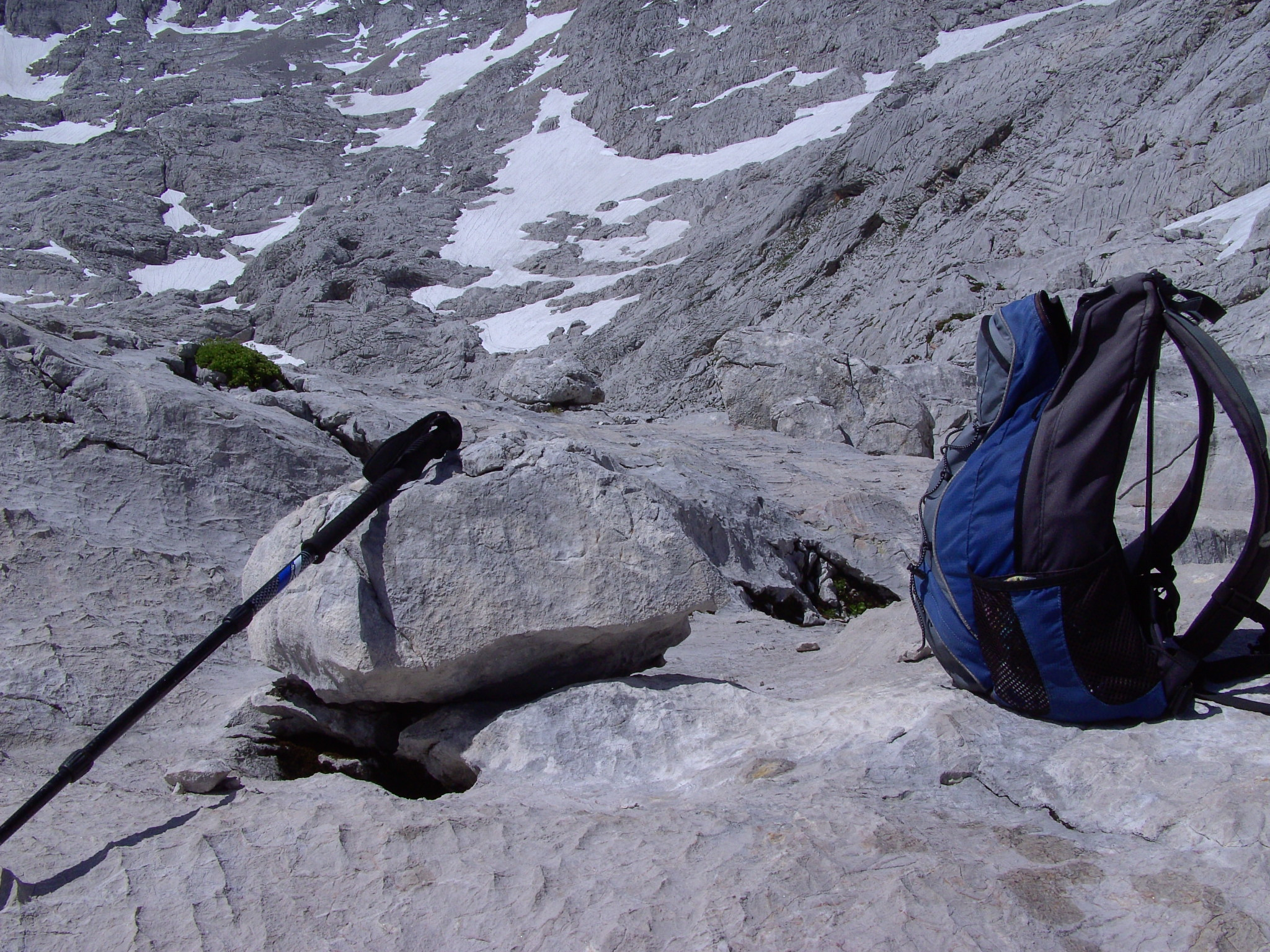 Karsttisch im Dachsteinkalk innerhalb des Egesenstadiums